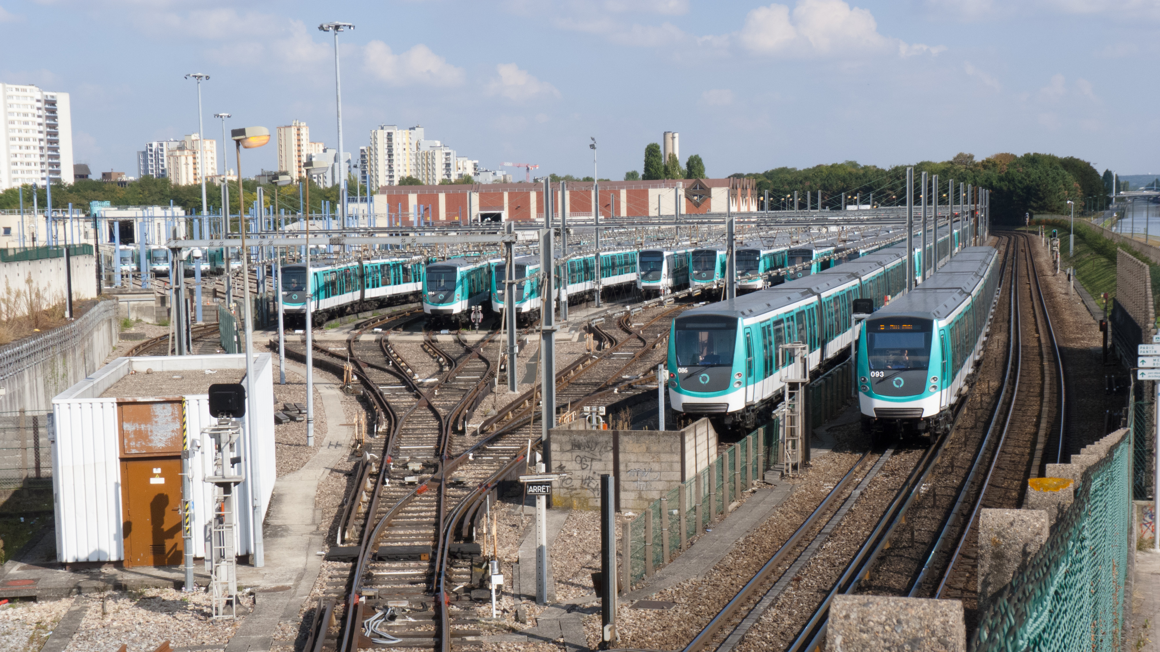 Atelier RATP de Bobigny